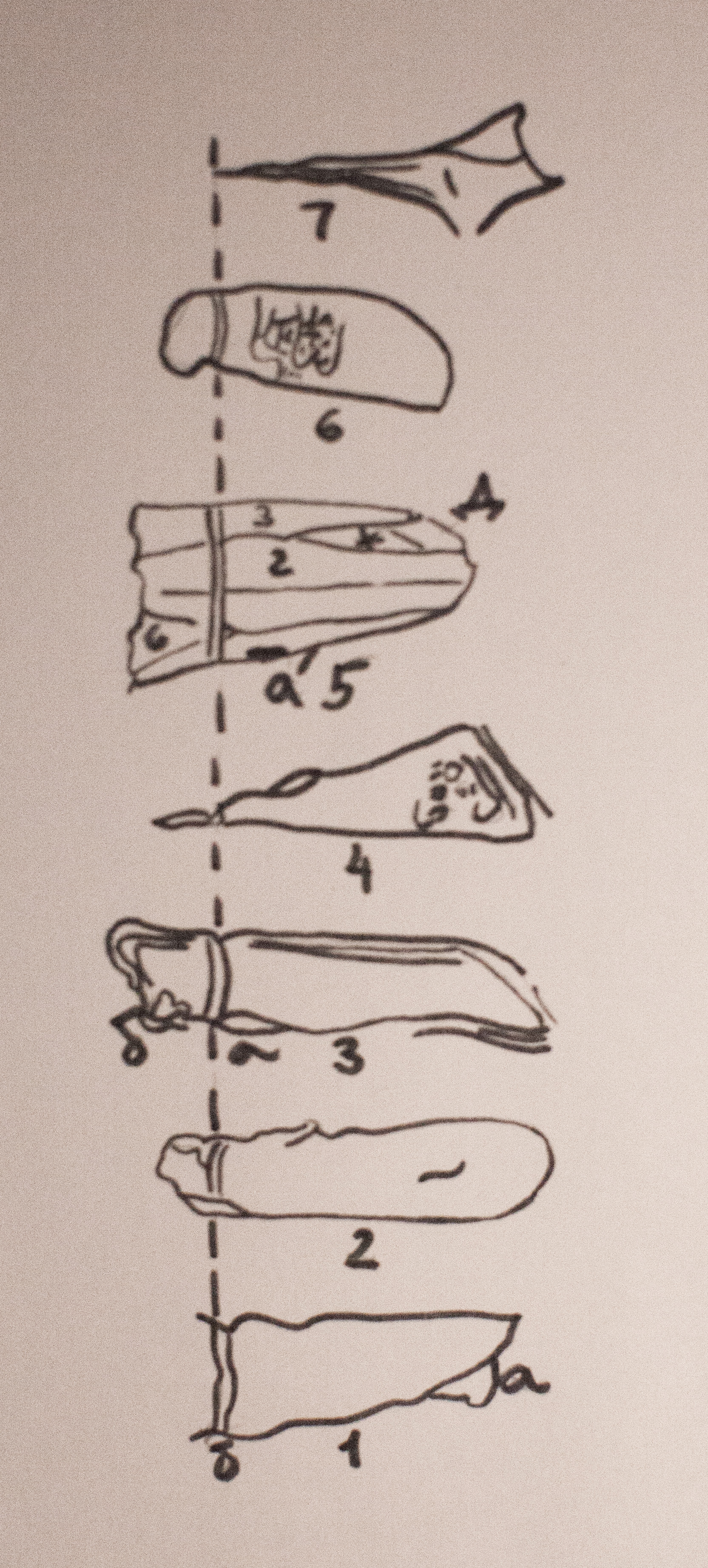 Главные грани алмаза "Шах" согласно исследованию А. Е. Ферсмана, опубликованному в книге "Кристаллография алмаза"